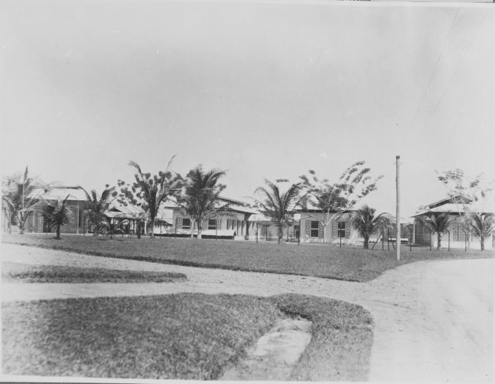 Foto. Rubberonderneming in de residentie Tapanoeli, Sumatra